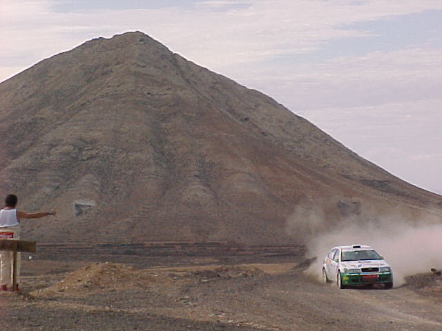 Rally de La Oliva, Fuerteventura